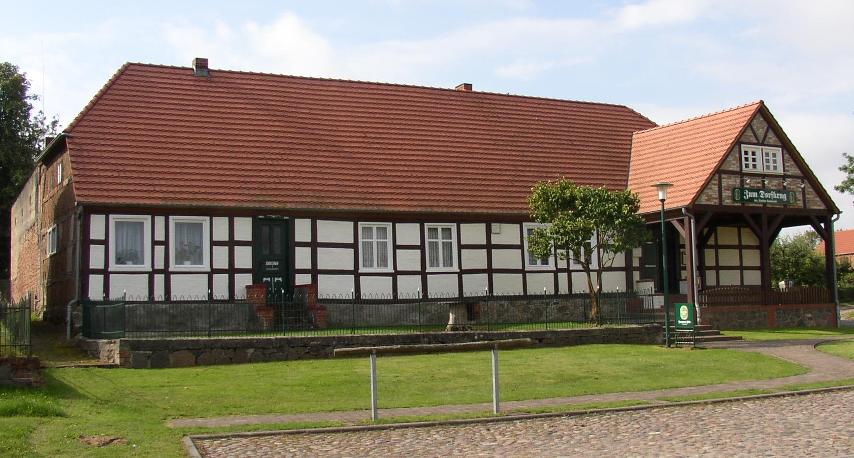 Denkmalgeschütztes Vorlaubenhaus in Kümmernitztal-Preddöhl in Brandenburg, Deutschland (18. Jh., Dorfstraße 53)